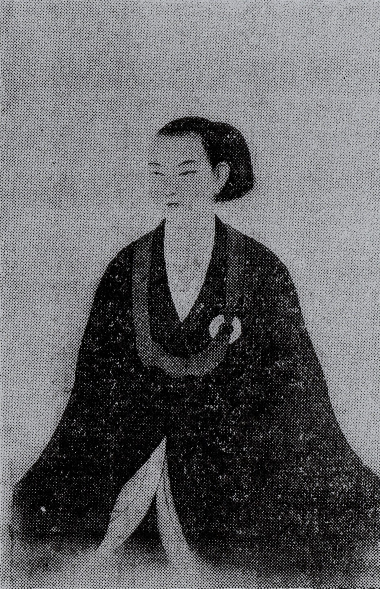 関政富の肖像。